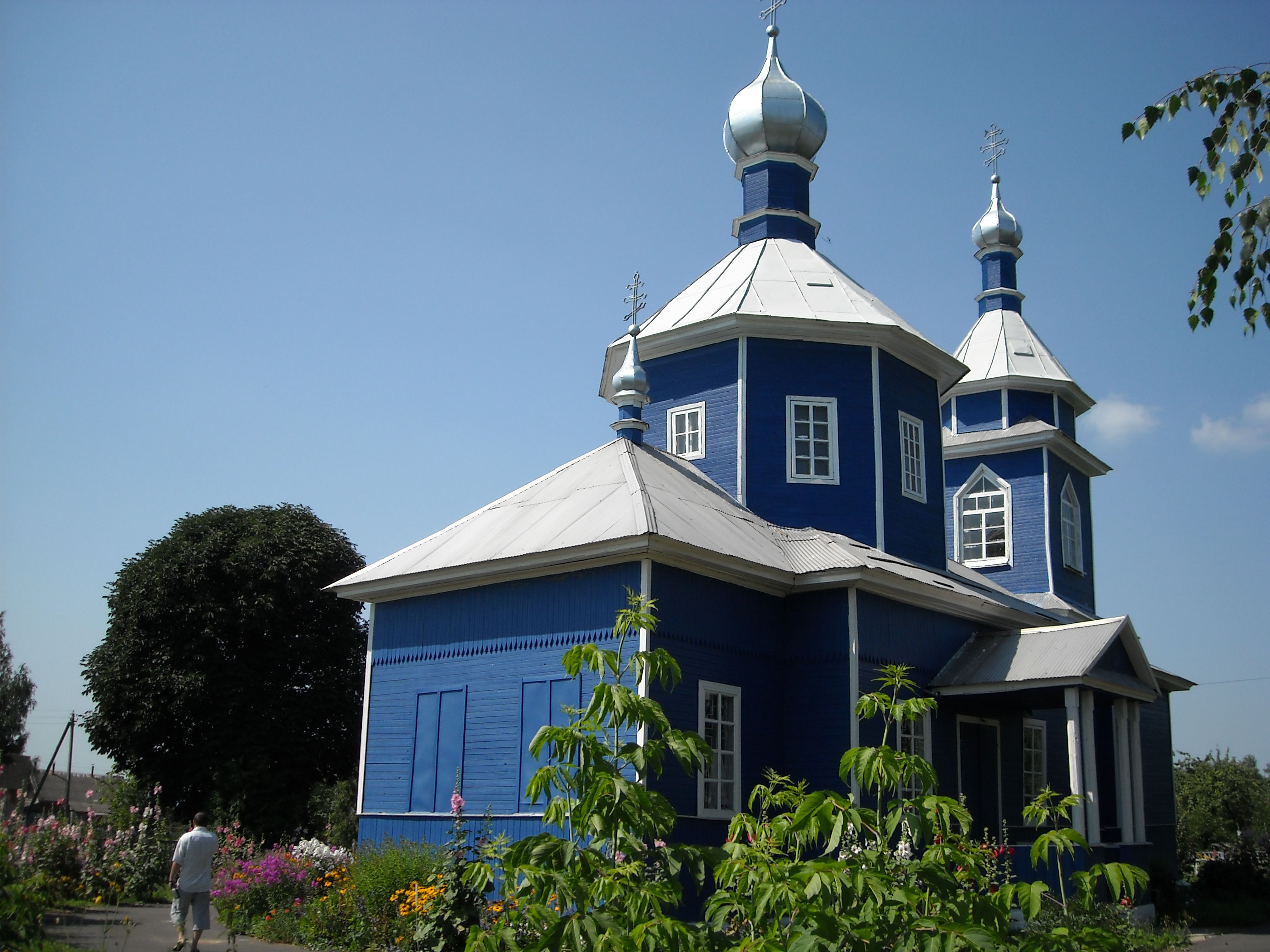 Беларуская (тарашкевіца): Троіцкая царква. в. Дварэц This is a photo of Belarusian heritage monument. Reference number: 313Г000615 ( WLM)